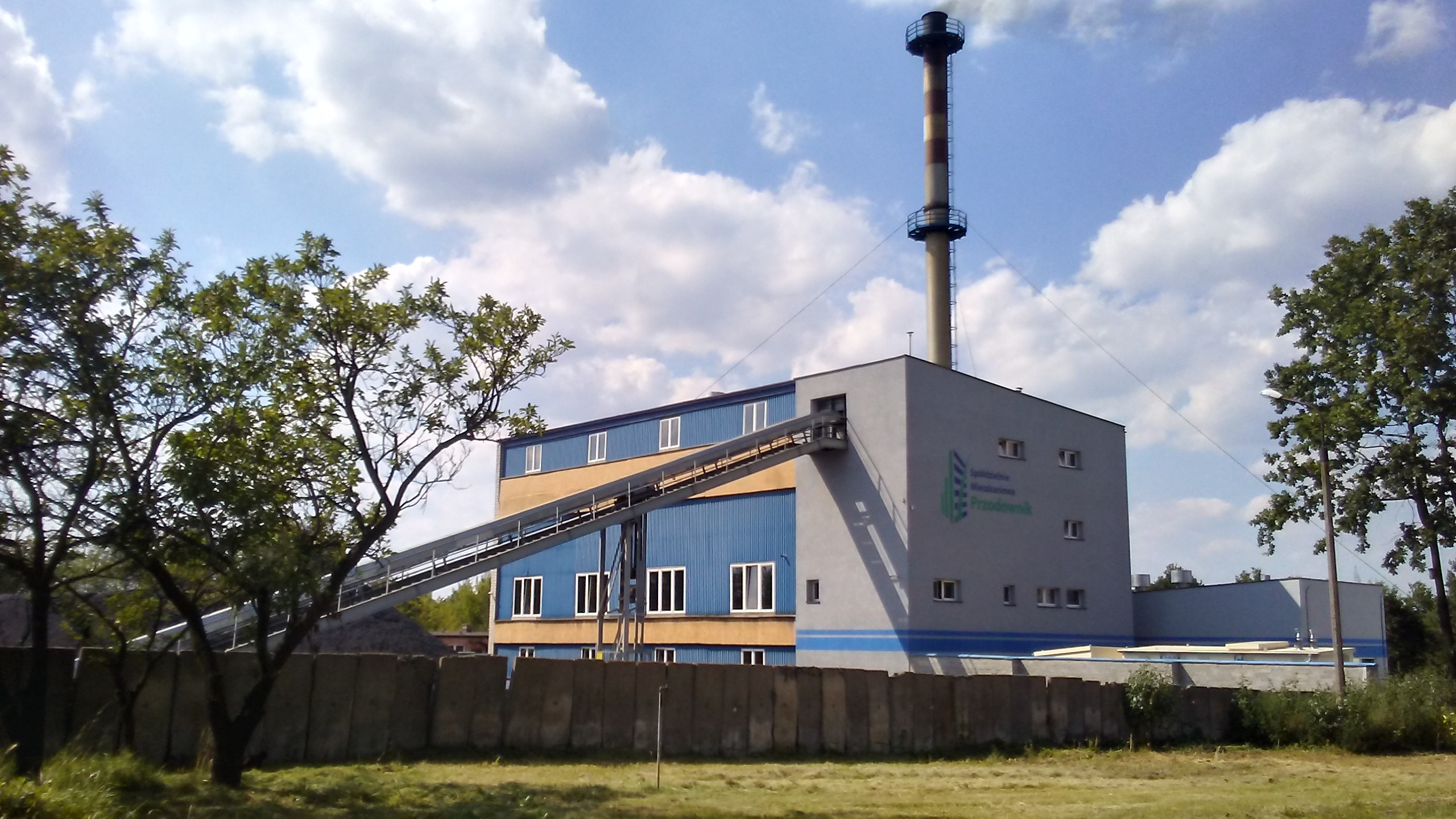 Electrociepłownia przy Niebrowie, SM Przodownik, Tomaszów Mazowiecki